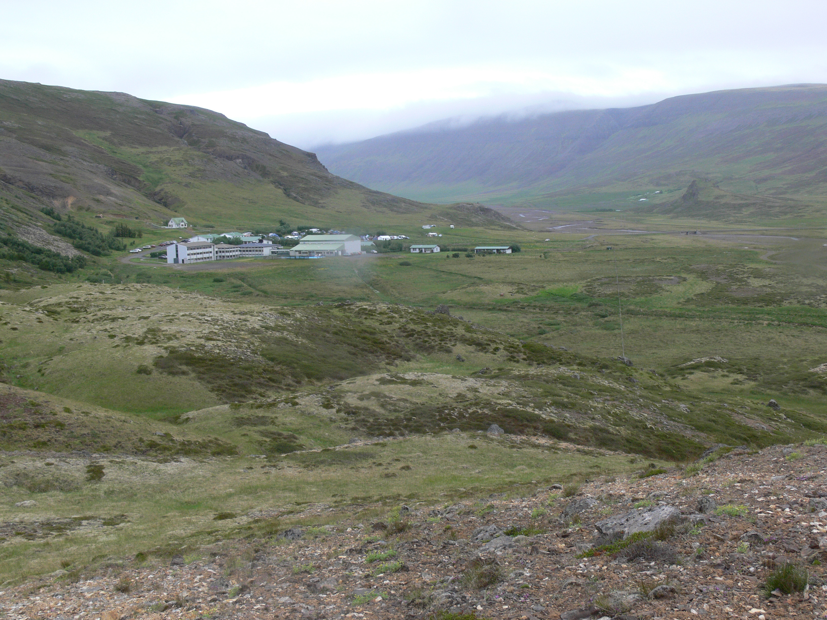 Blick von Laugar í Sælingsdal in Richtung Sælingsdalur. Der Hof Sælingsdalur war der Geburtsort von Guðrún, einer Hauptperson der Laxdæla.